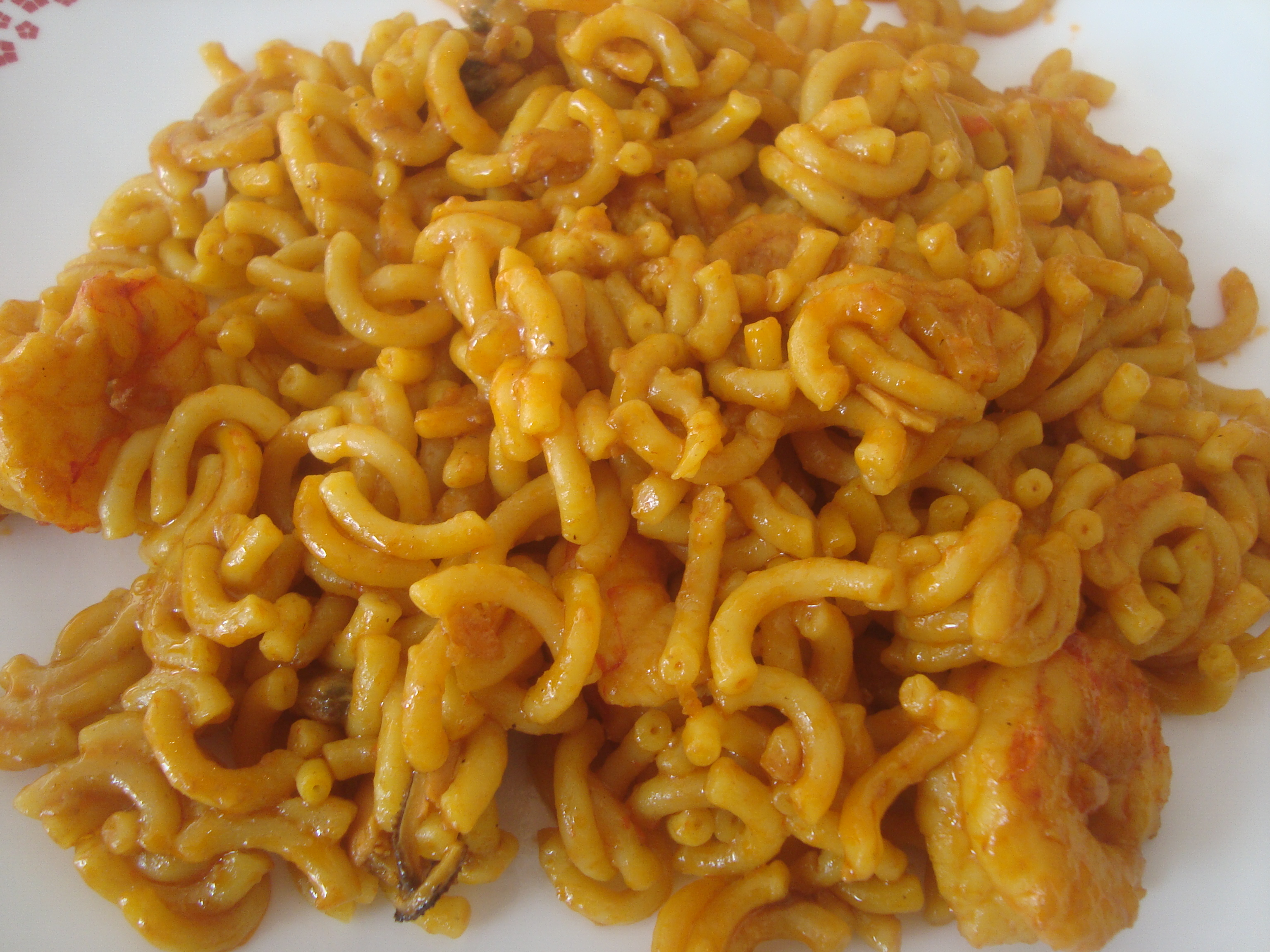 Fideuada (España).